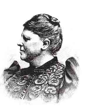 Hulda Lundin (1847-1921)